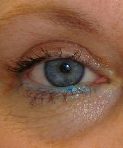 Foto na de ooglidcorrectie